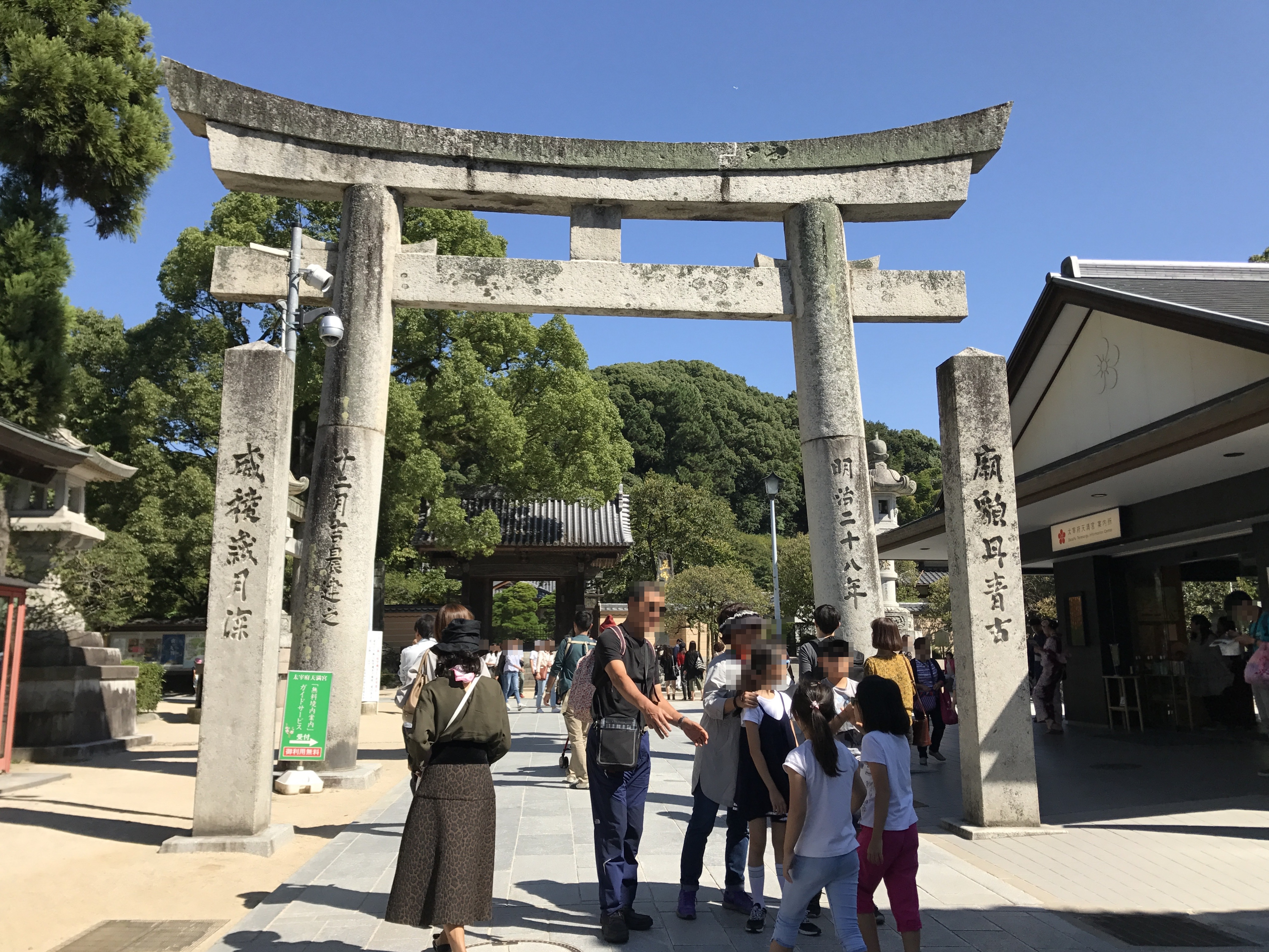 太宰府天満宮・表参道の鳥居